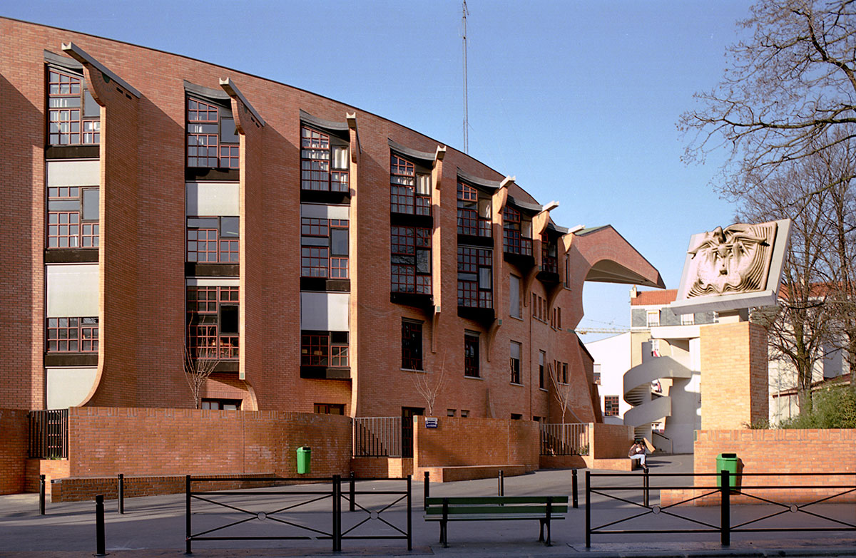 Collège Elsa Triolet à Saint-Denis (93), France